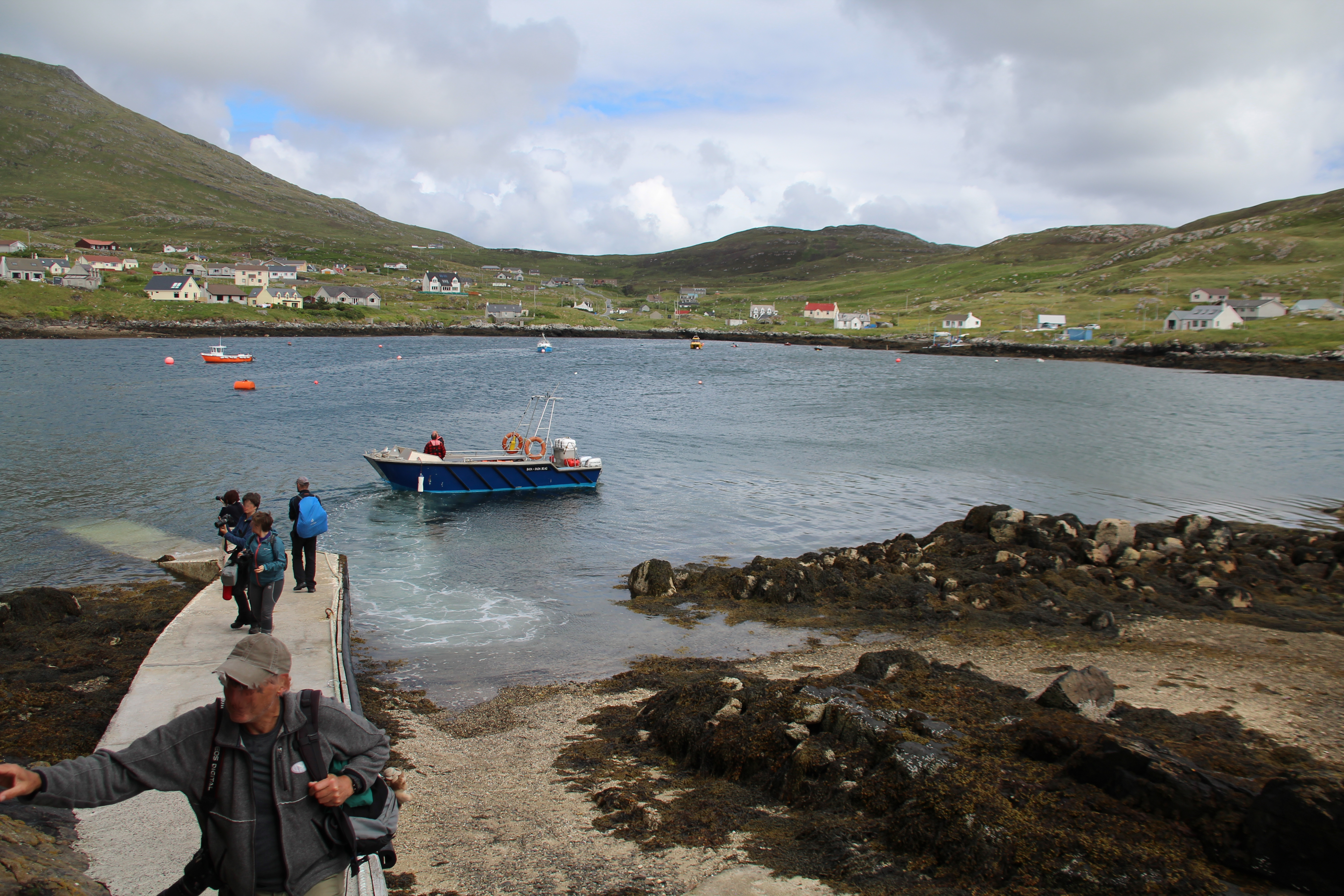 Auf der Bootsrampe von Kisimul Castle. Blick nach Castlebay. Links angeschnitten der Heaval. Äußere Hebriden, Schottland